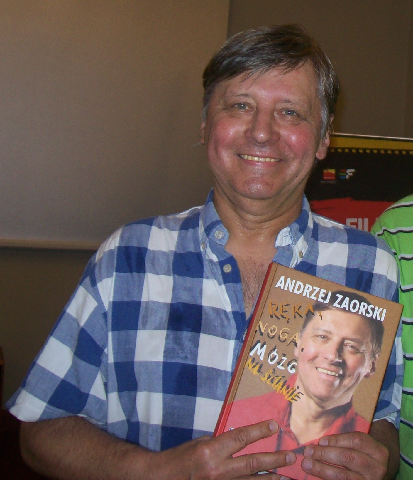 Andrzej Zaorski